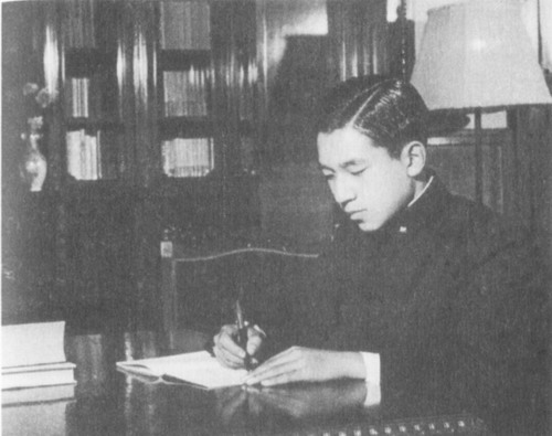 Ուսանող Ակիխիտոն